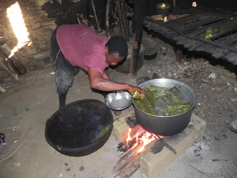 Les étapes de la préparation du Mitoumba, met traditionnel du peuple Bassa.